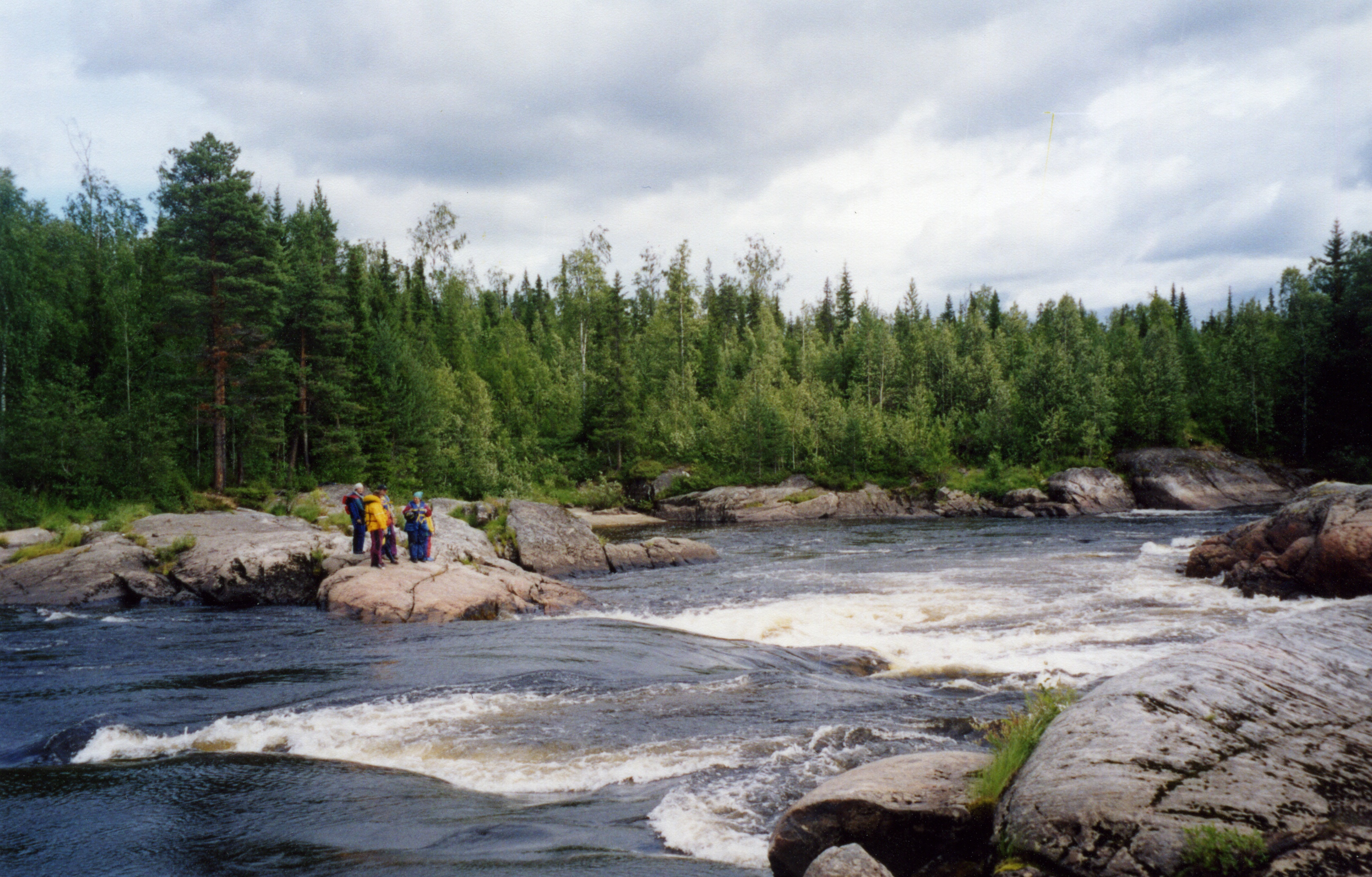 Тумча